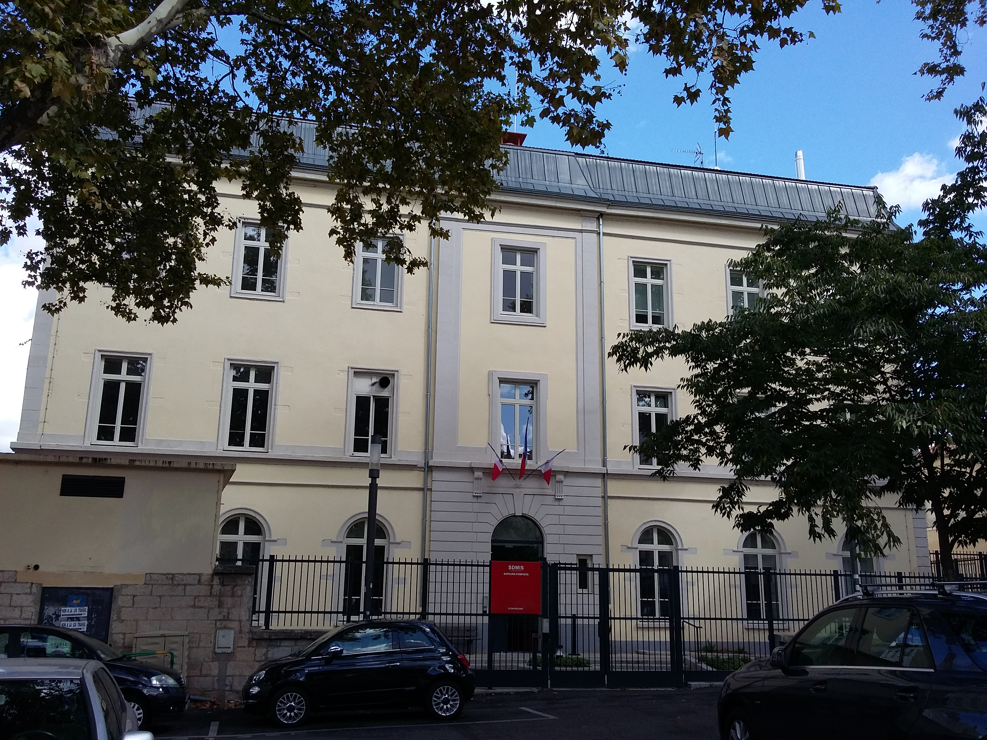 Centre d'intervention Lyon Rochat (caserne pompiers) vue depuis la place Saint-Louis à Lyon (France).